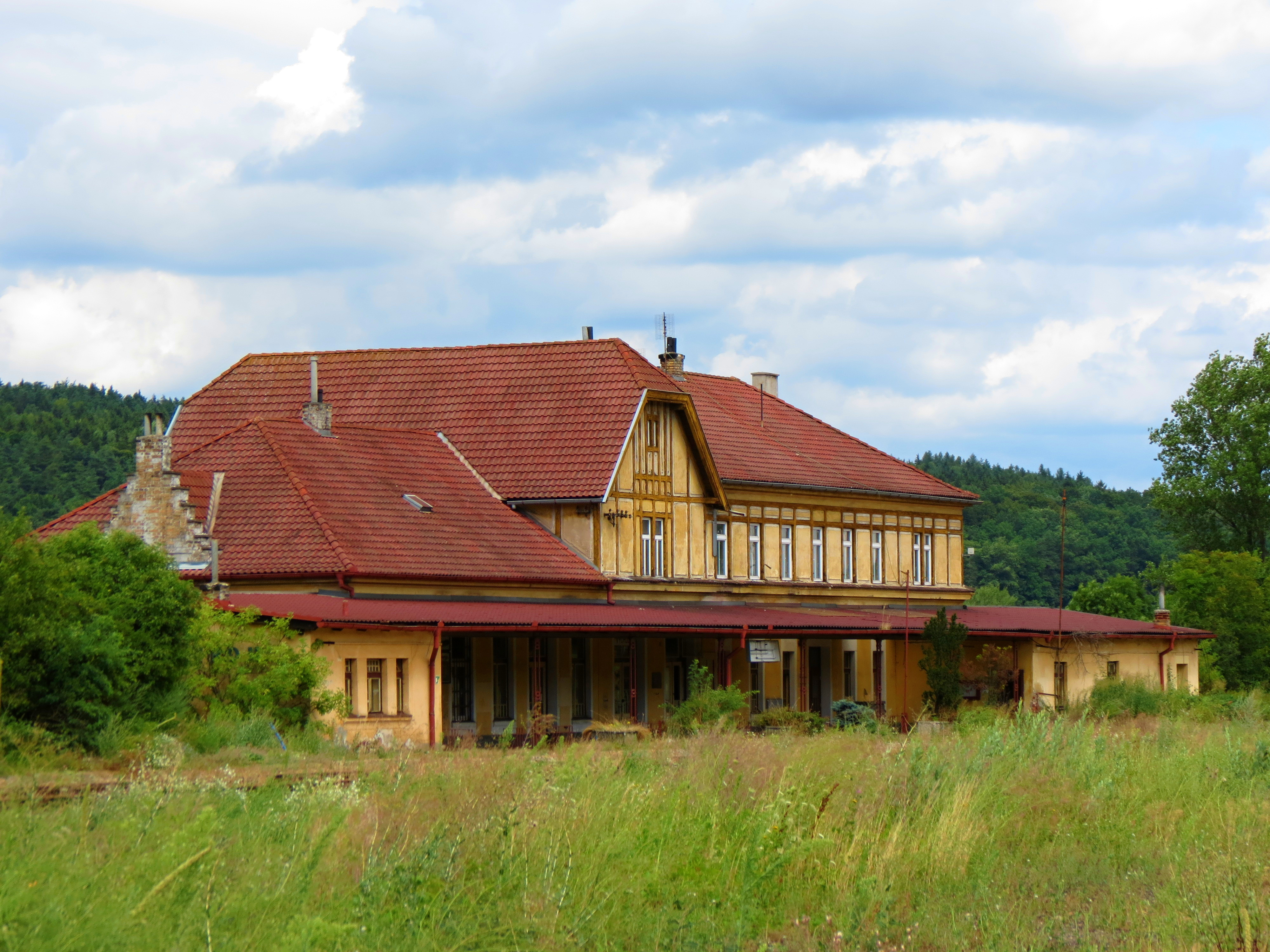 Pohled na budovu zrušené stanice Zbiroh.